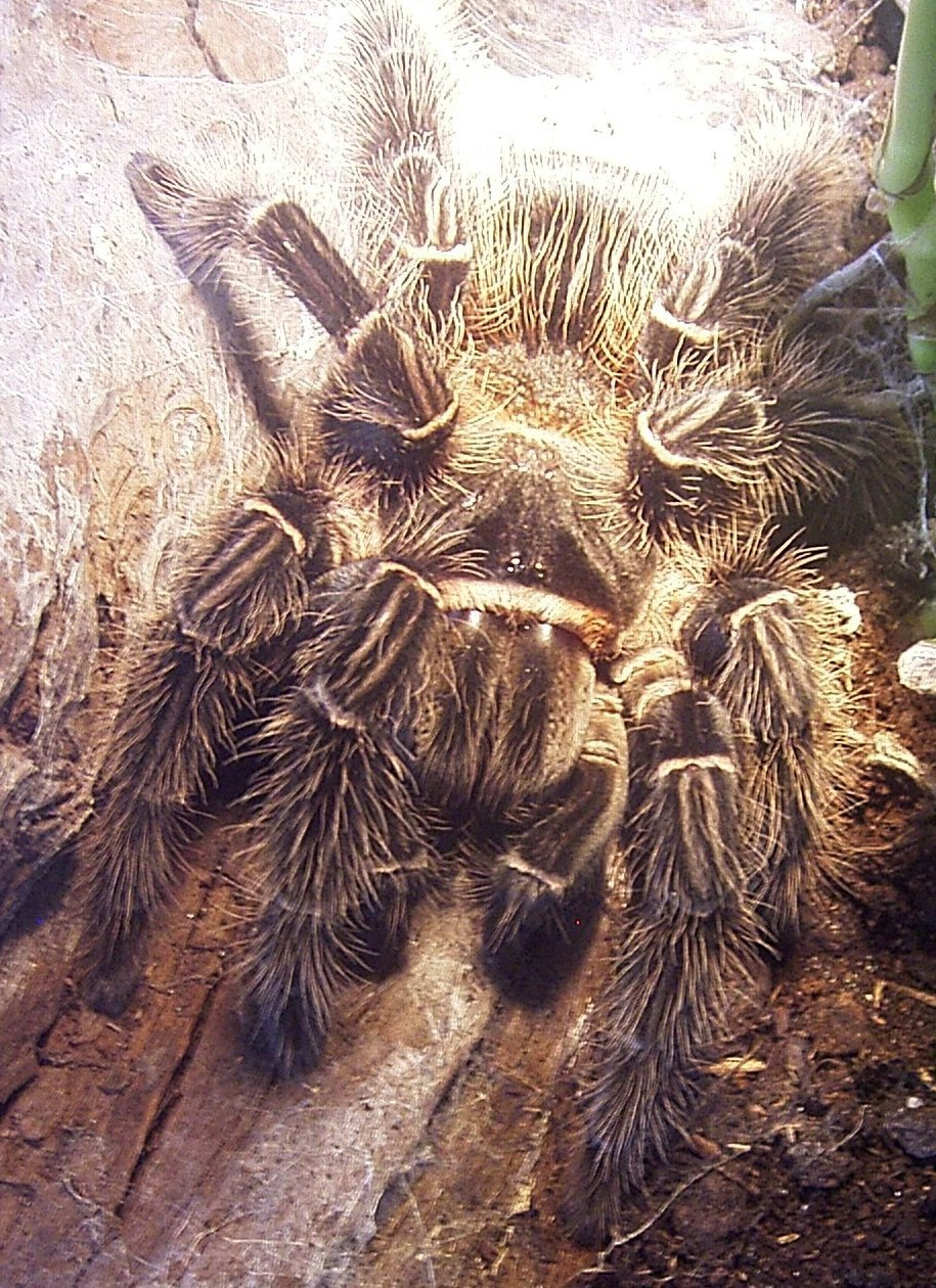 Lasiodora parahybana